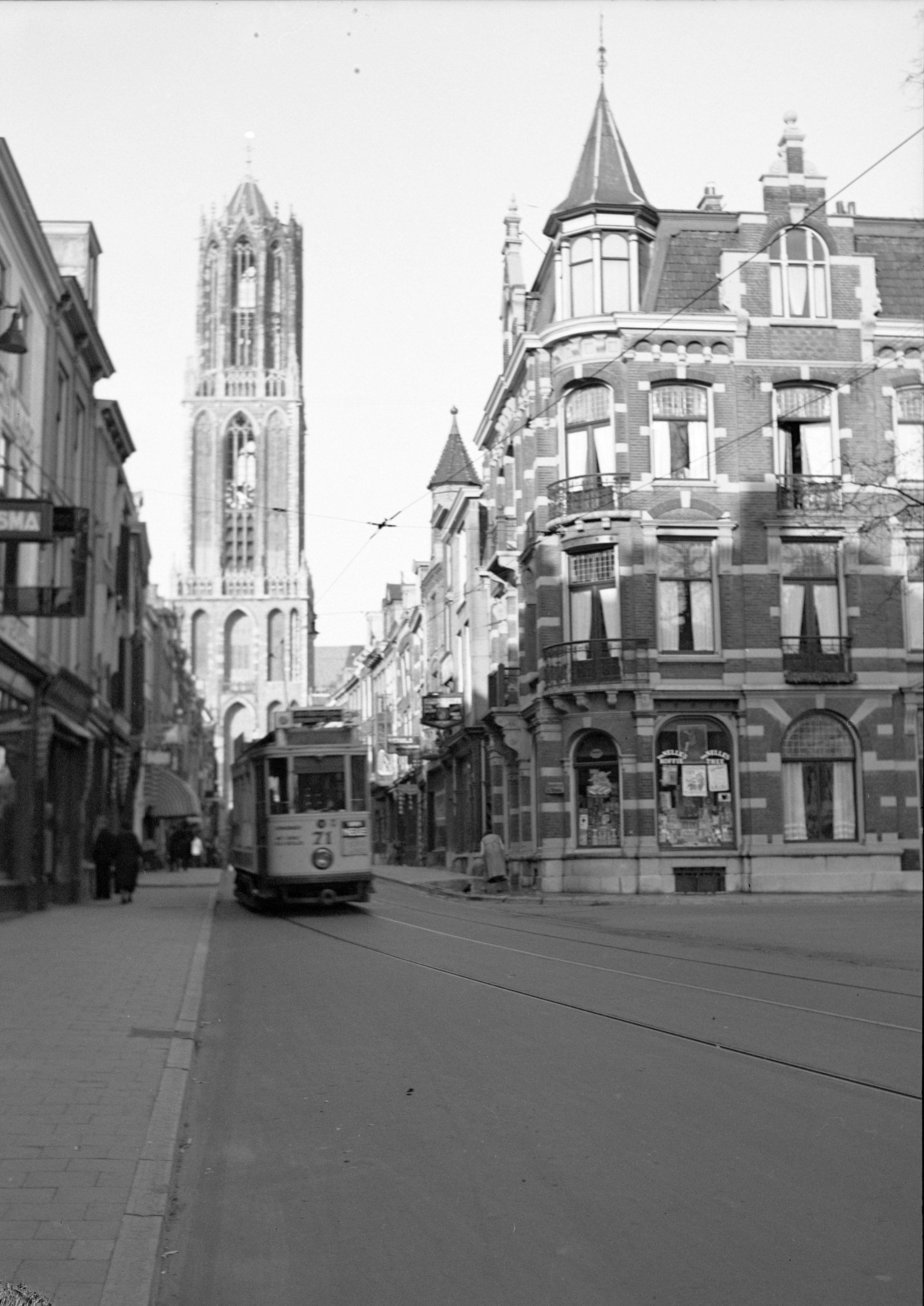 De Zadelstraat in Utrecht met op de achtergrond de Domtoren. Op de voorgrond een motorwagen van de Gemeente Tram Utrecht (GTU), die in 1938 werd opgeheven. Deze motorwagen reed van 1940 tot 1961 in Amsterdam.